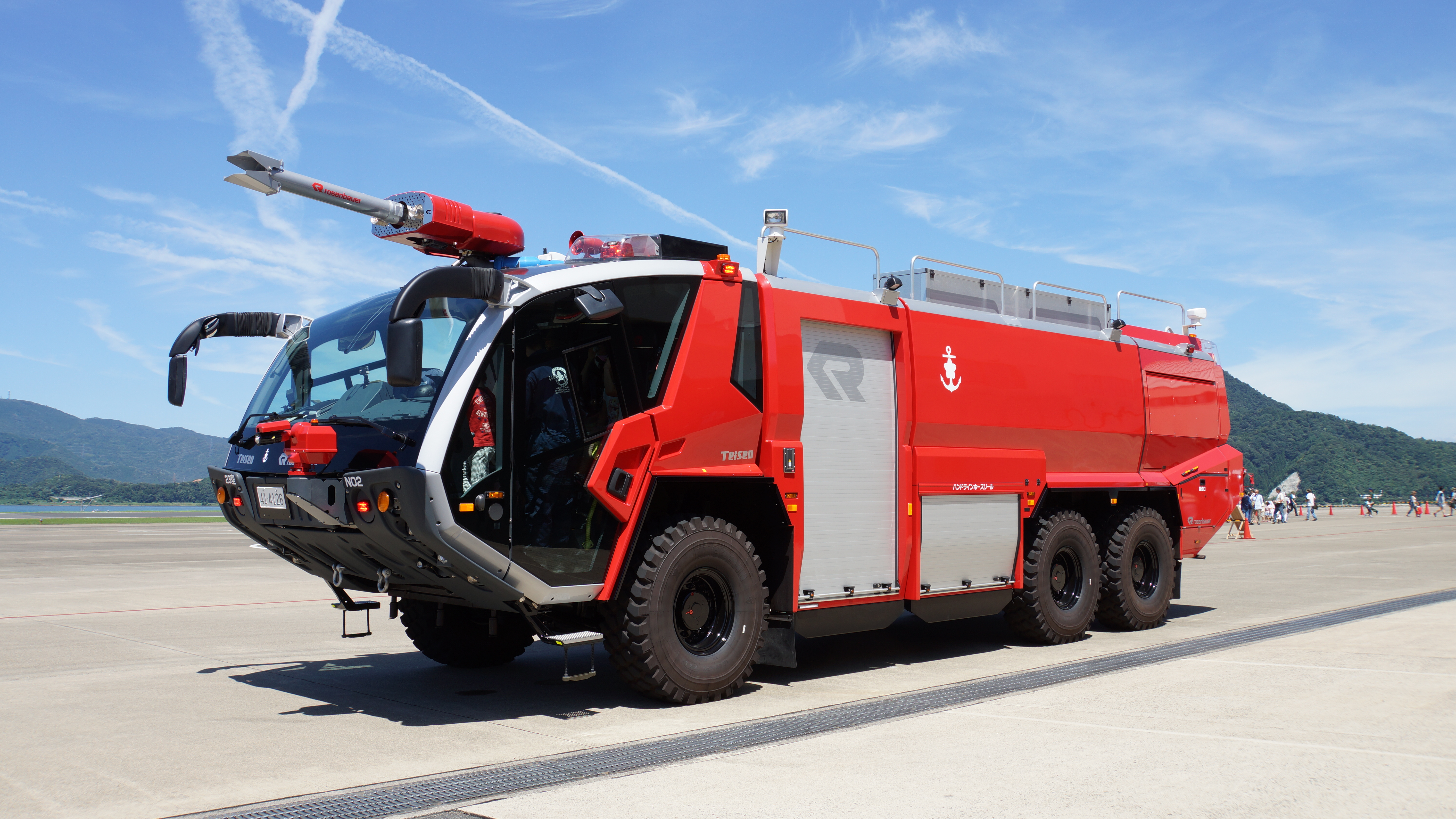 海上自衛隊 救難消防車IB型（ローゼンバウアー社製パンター6×6）。 2015年7月26日 舞鶴航空基地にて。